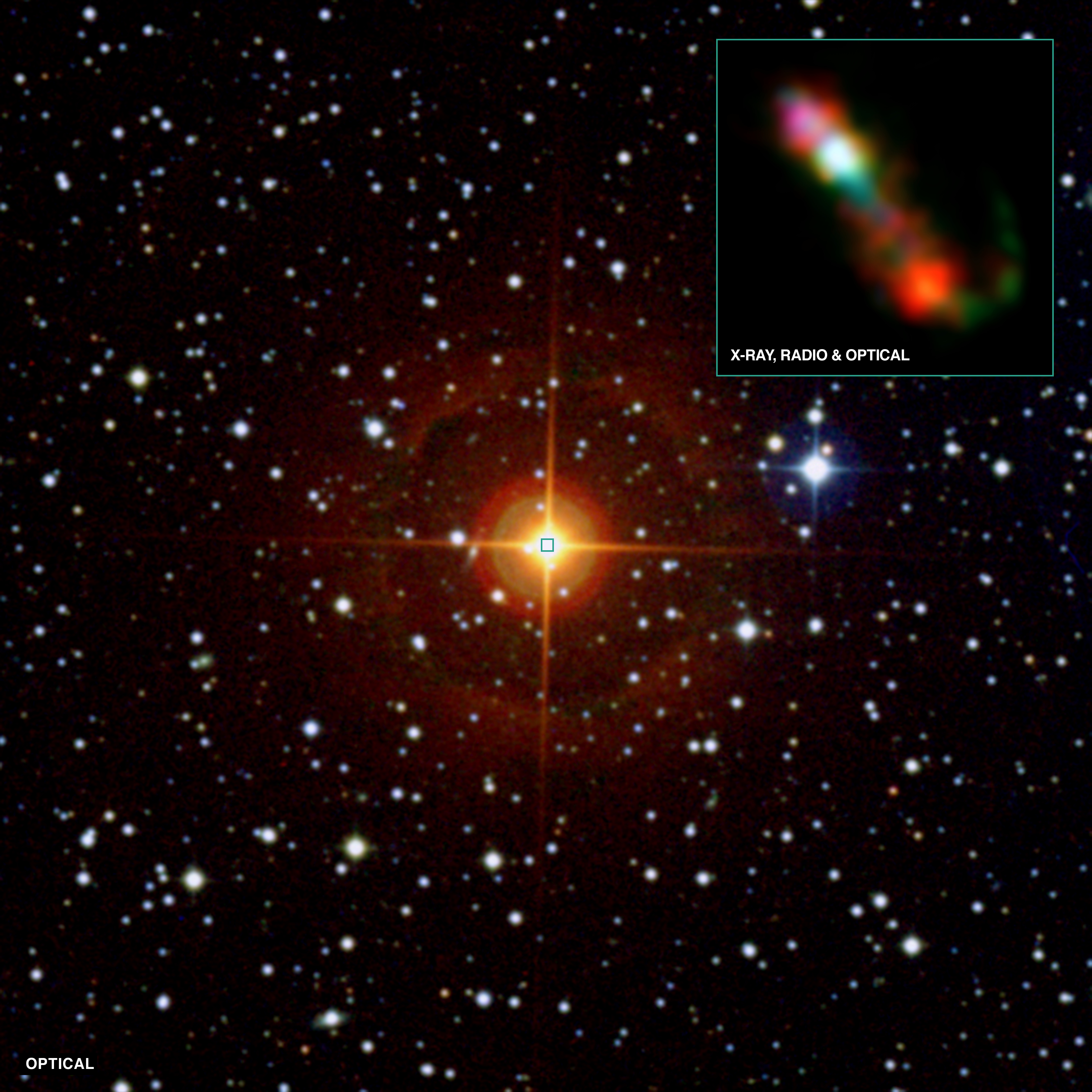 CH Cygni